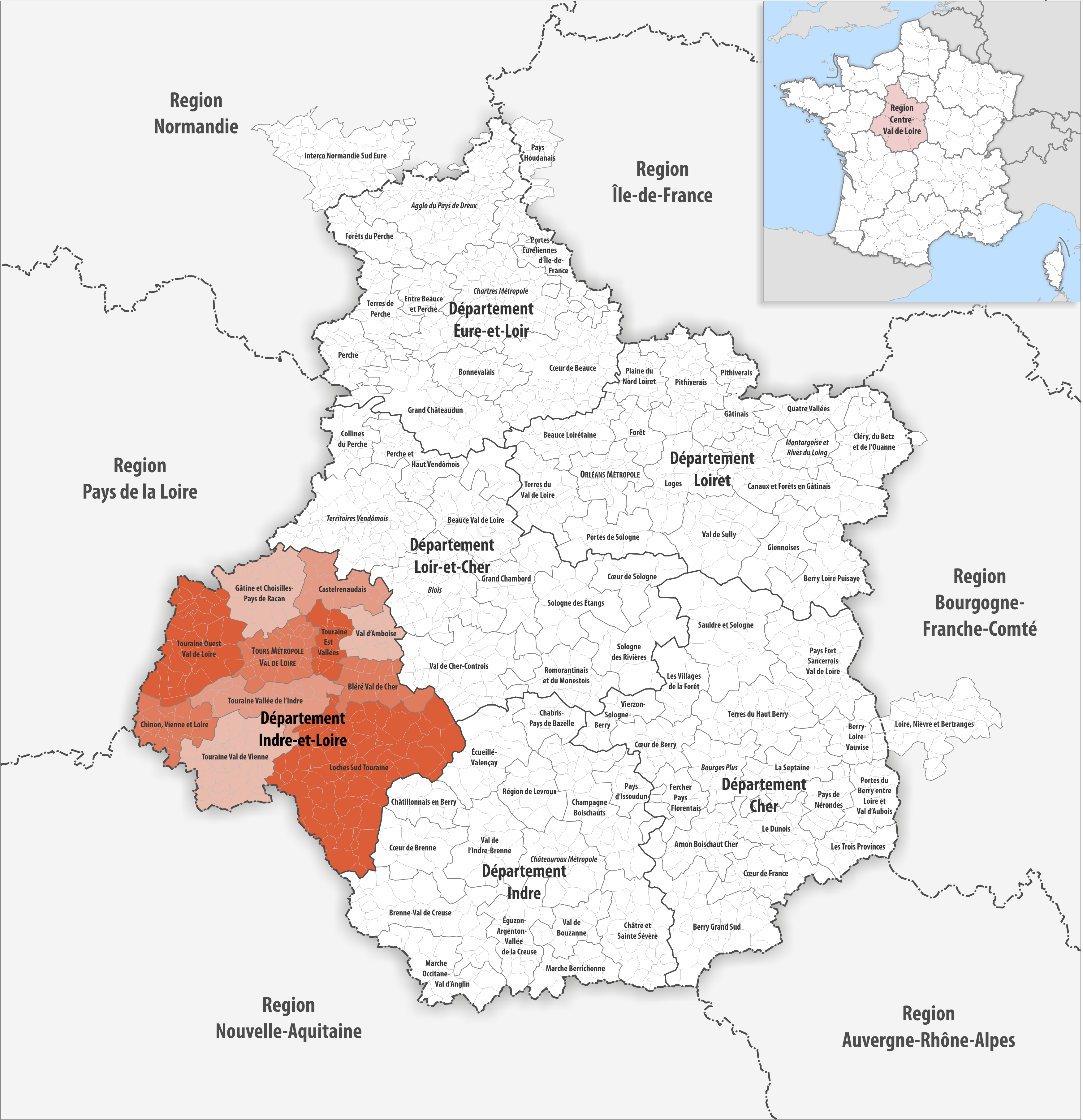 Gemeindeverbände im Département Indre-et-Loire